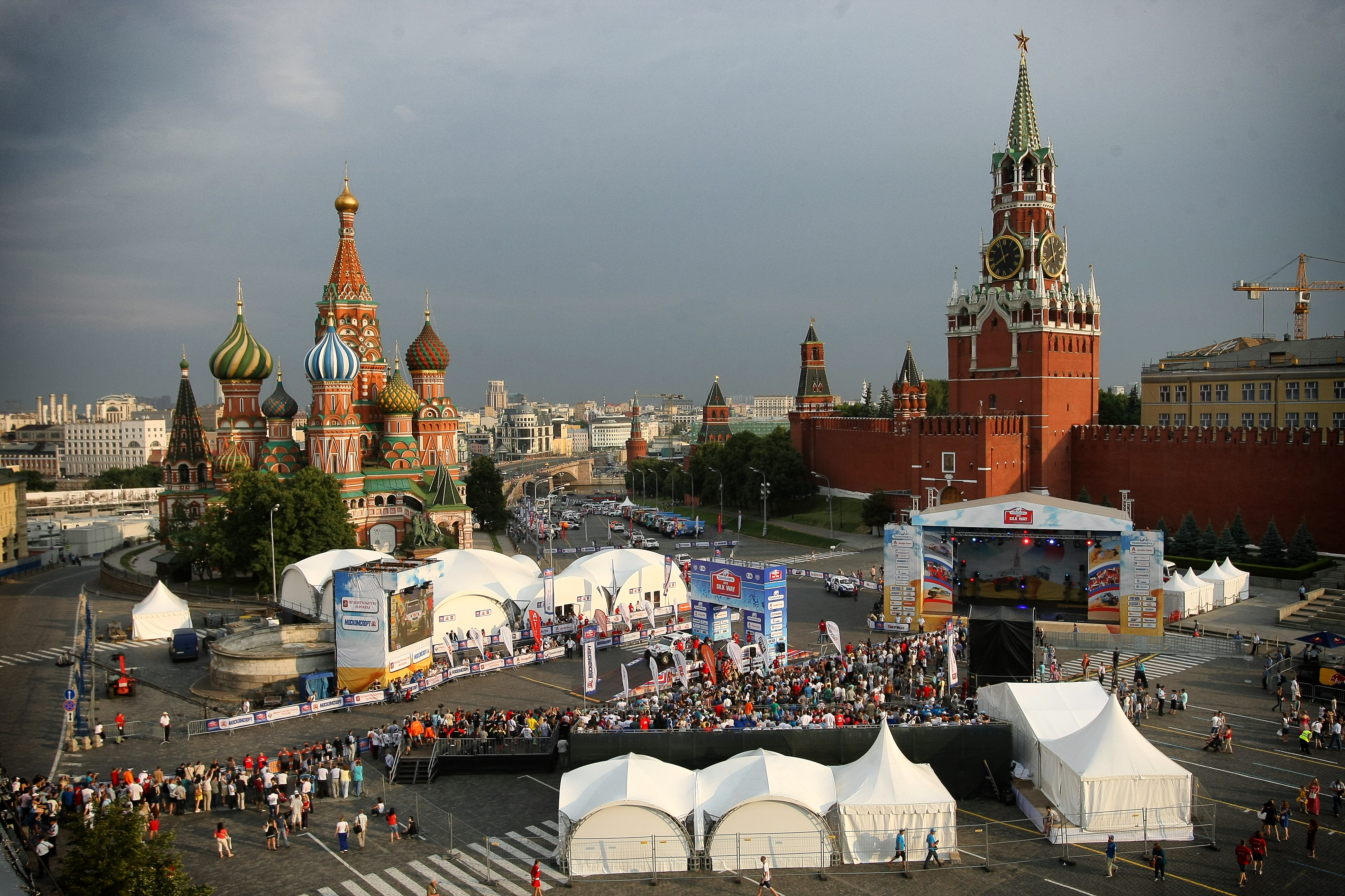 Старт ралли-марафона "Шелковый путь 2013" на Красной площаид в Москве